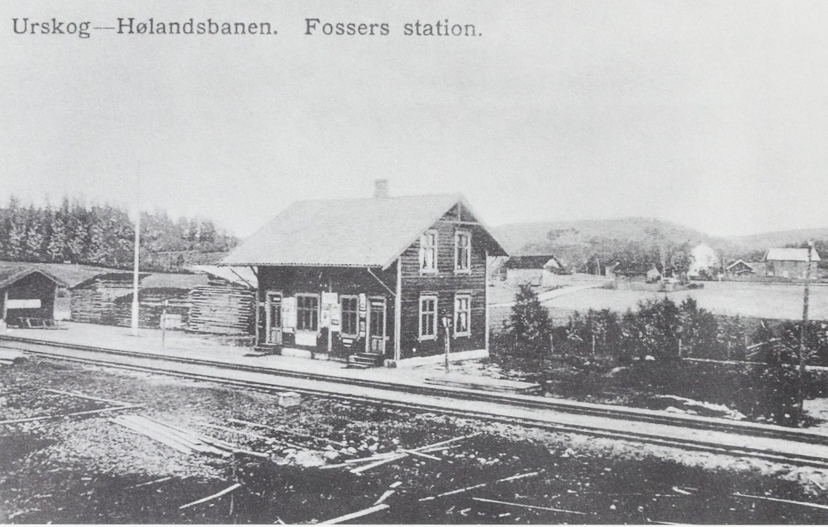 Fosser stasjon fotografert i 1908, fra et gammelt postkort gjengitt i boken «Banen og bygda: Tertitten gjennom hundre år».